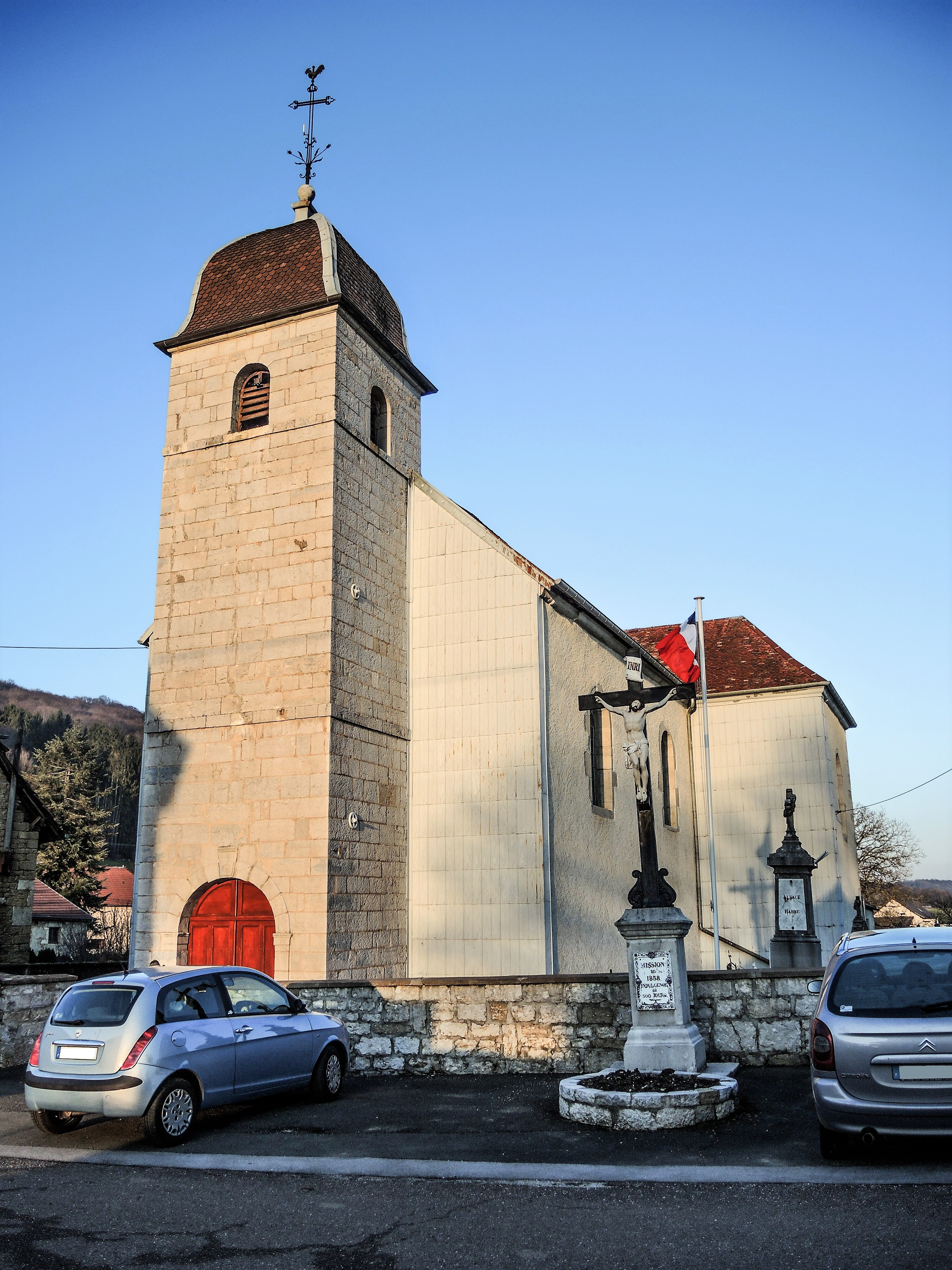 Eglise Notre-Dame. Brétigney-Notre-Dame. Doubs